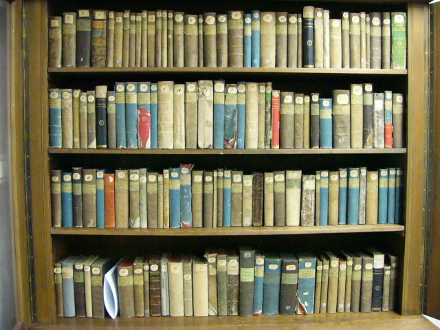 Leers'sche Bibliothek